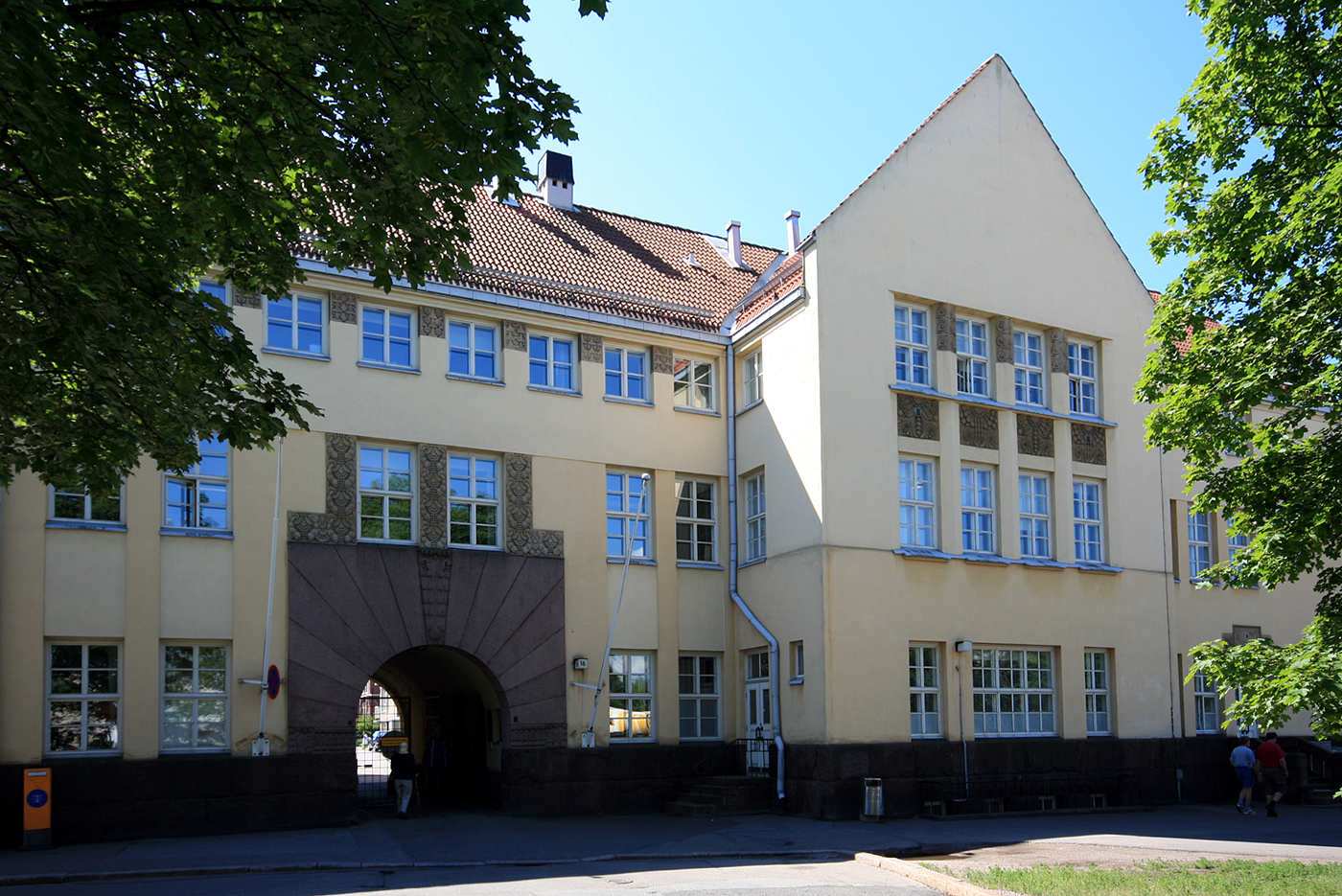 Marian sairaala, Mechelininkatu, Helsinki.